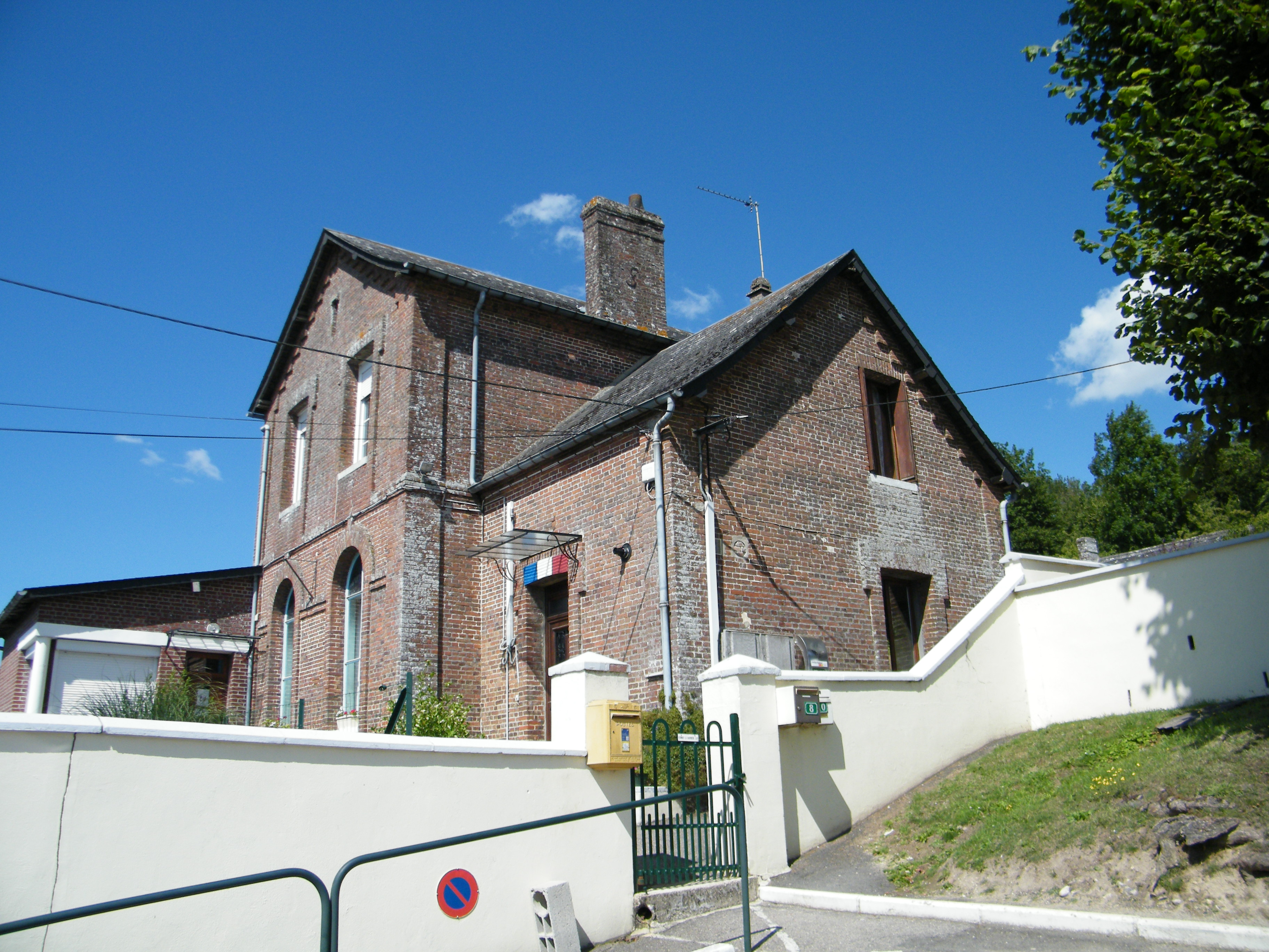 Aubermesnil-aux-Erables, Seine-Maritime, France, Mairie